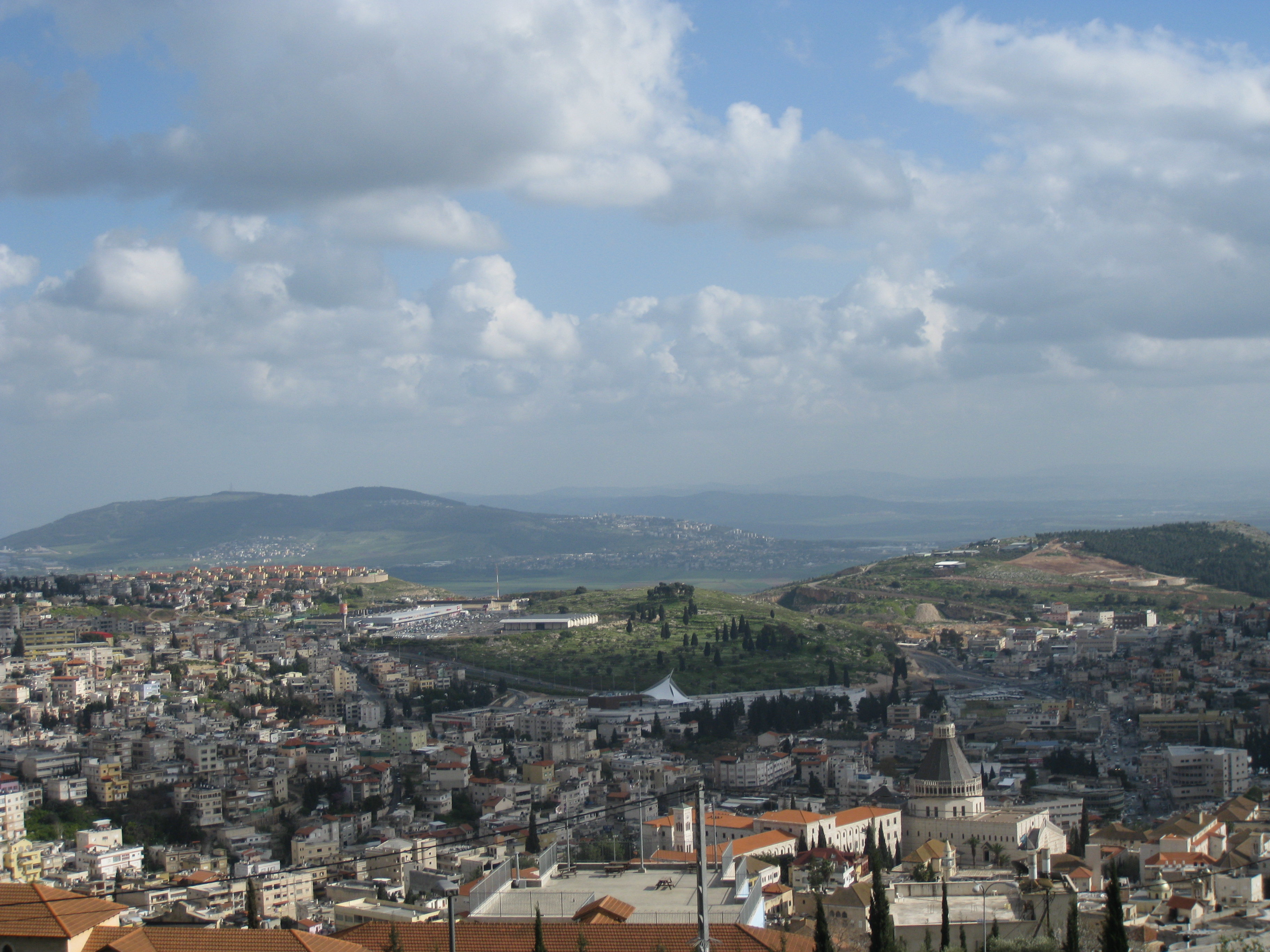 Views of Nazareth מבט פנורמי על נצרת